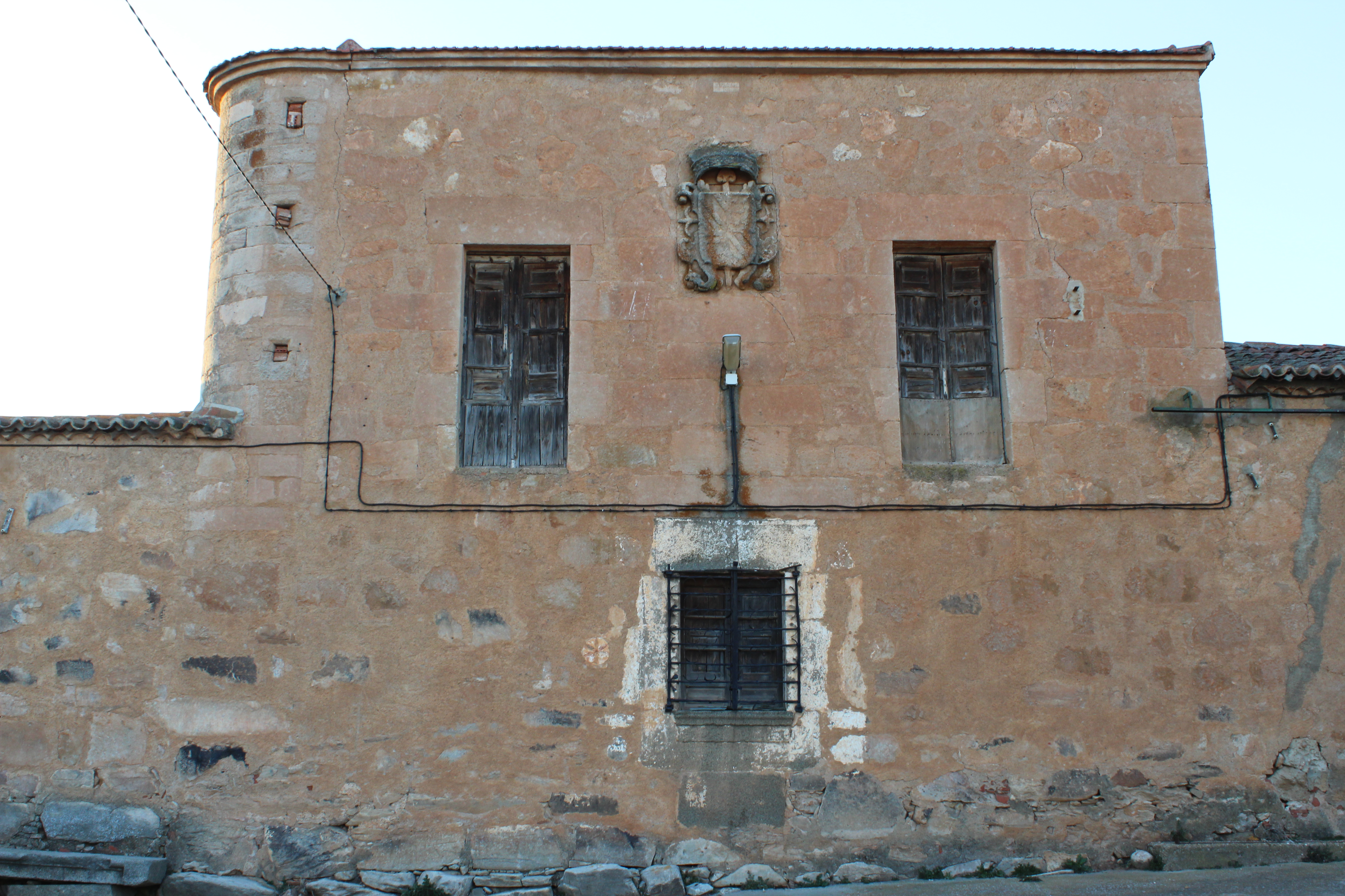 Fachada del palacio del Marqués de Canillas, en Canillas de Abajo. En la calle El Palacio.